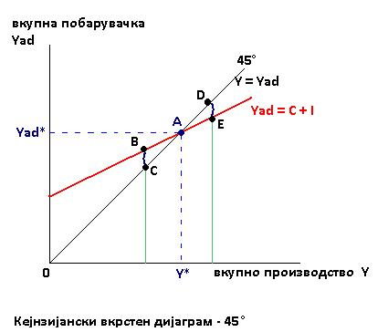 Кејнзијански вкрстен дијаграм